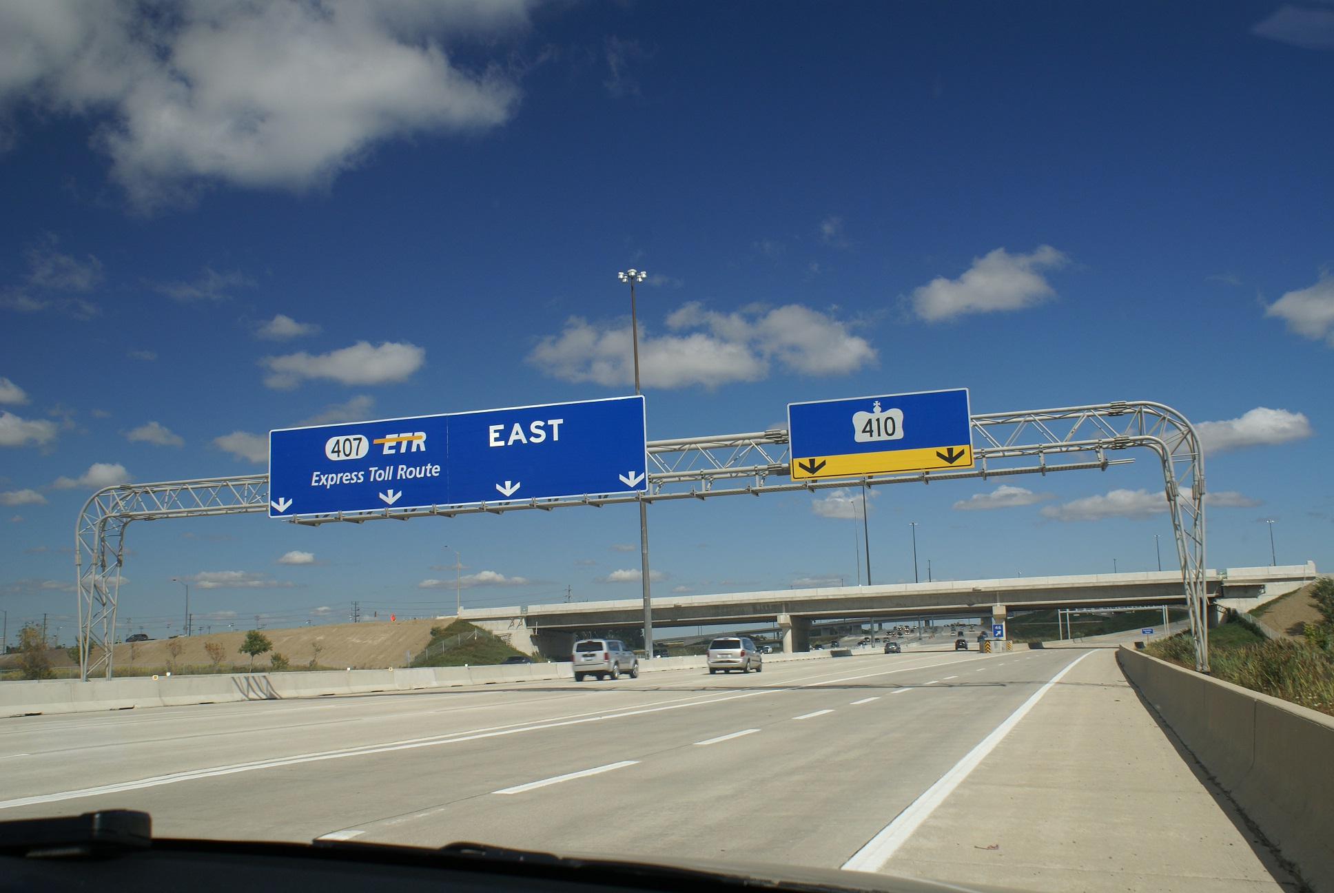 Автомагістраль 407 (Онтаріо). Інформаційно-попереджувальний знак.